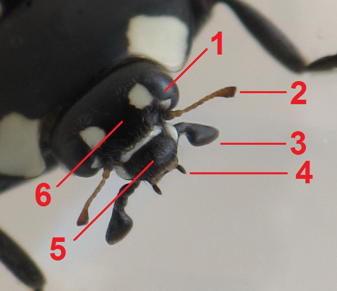 Marusiña en Vilarromarís, Oroso, Galiza.